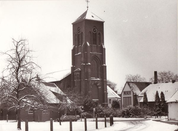 Die Pfarrkirche St. Silvester 1984, noch mit dem Nachkriegs-Turm